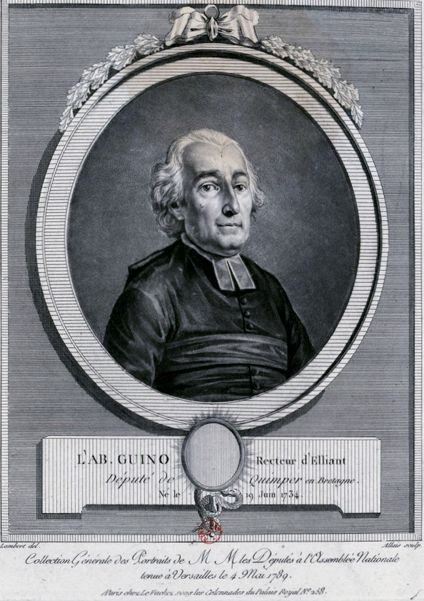 L'abbé Jacques-Louis Guino, né le 19 juin 1734 à Guingamp, recteur d'Elliant, député de la sénéchaussée de Quimper aux Etats généraux de 1789 (par Louis Jean Allais).